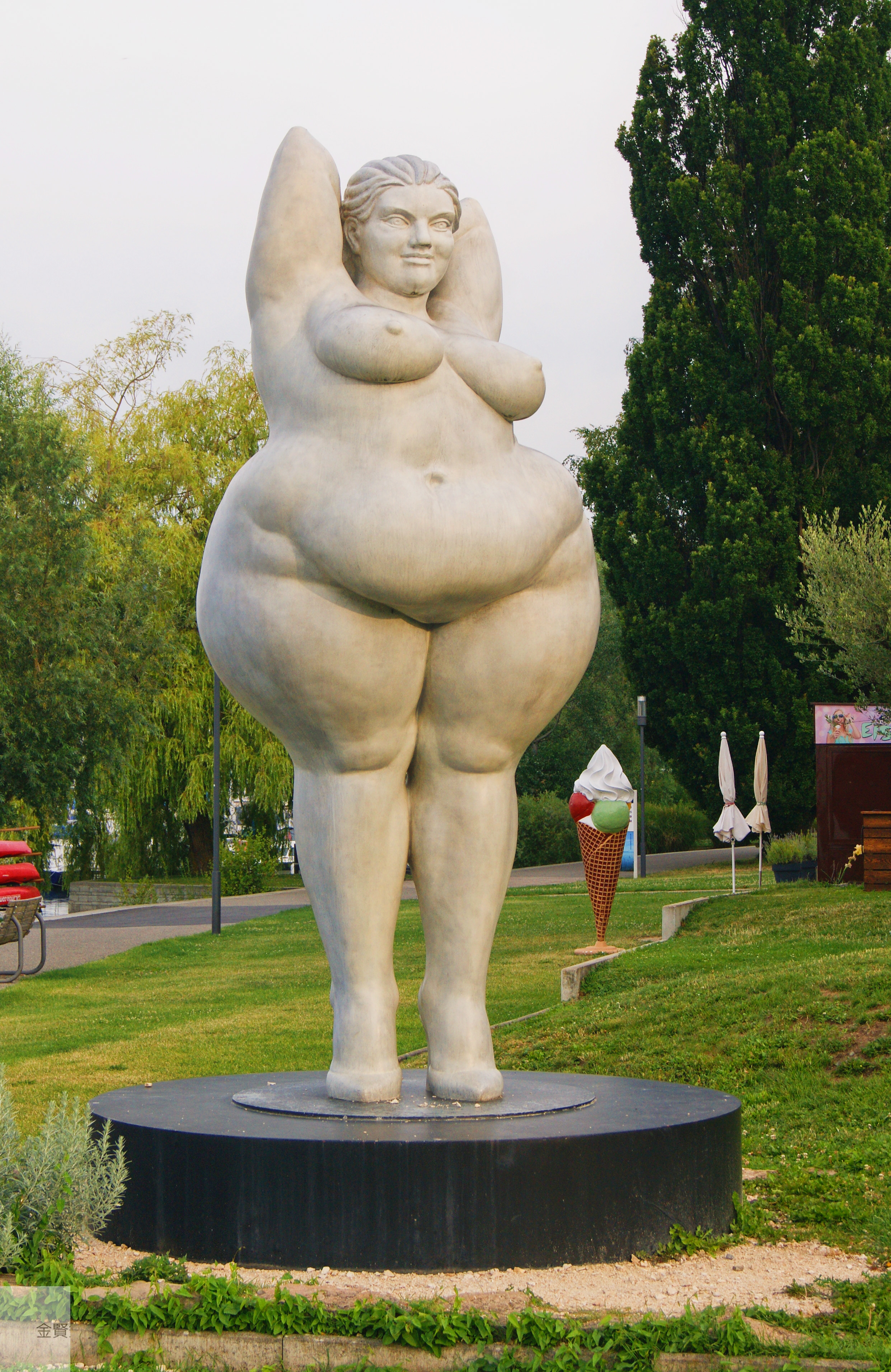 Yolanda, Skulptur, Weiblichkeit, Ludwigshafen am Bodensee